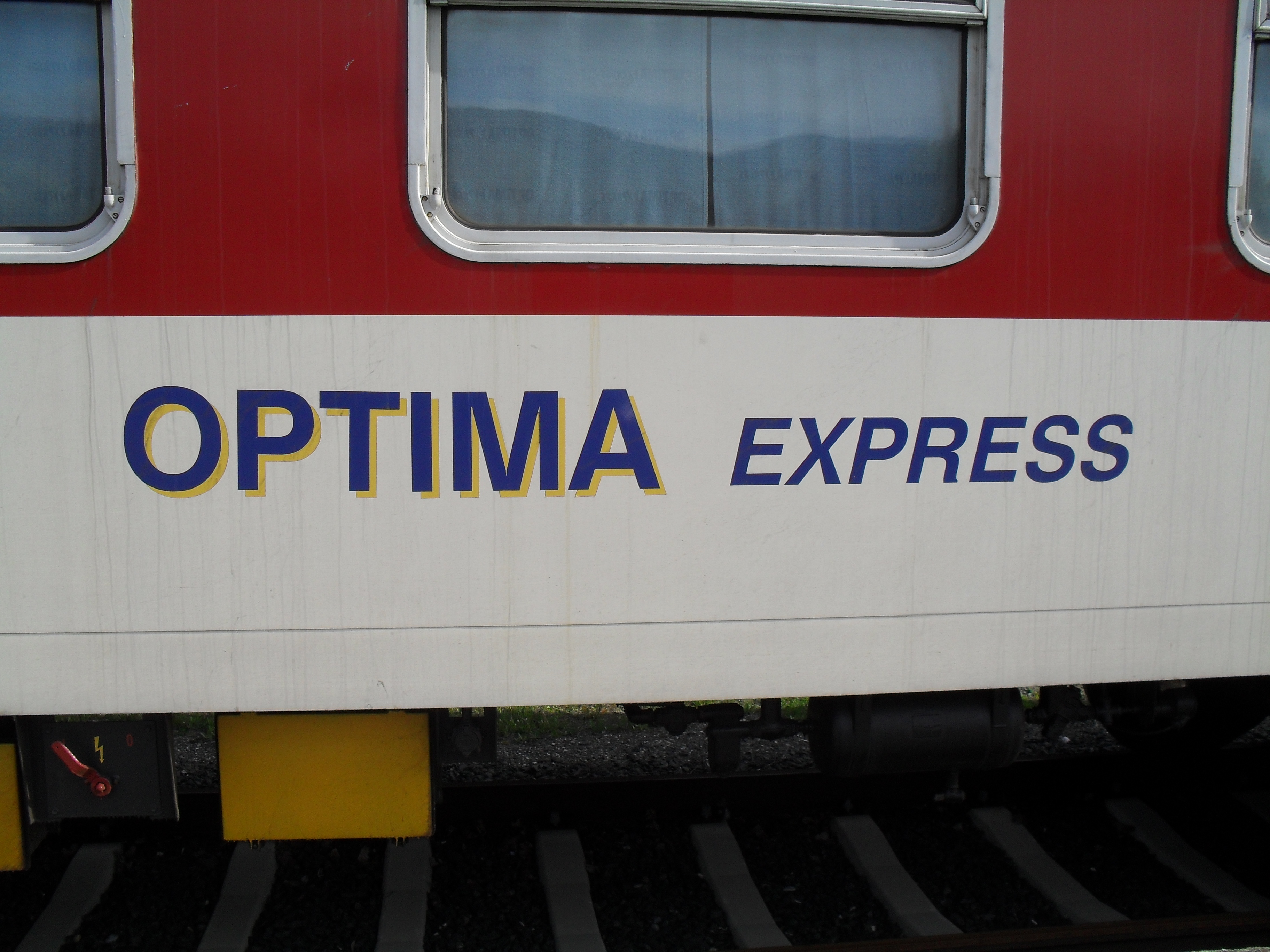 Schriftzug